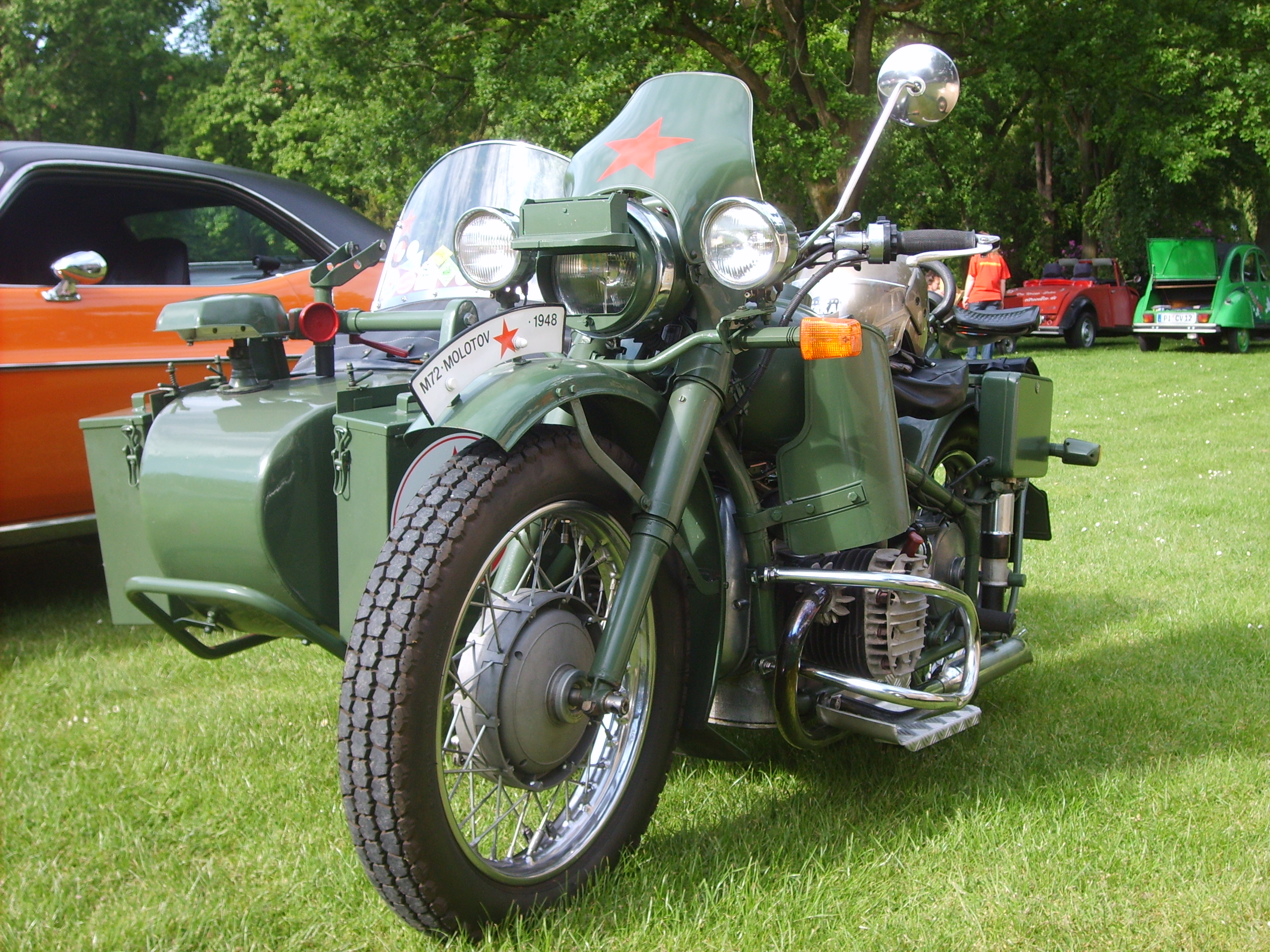 M72 Molotow 2 Zylinder, 750 ccm, 22 PS, Baujahr 1948 mit Seitenwagen bei der Pinneberg Mobil